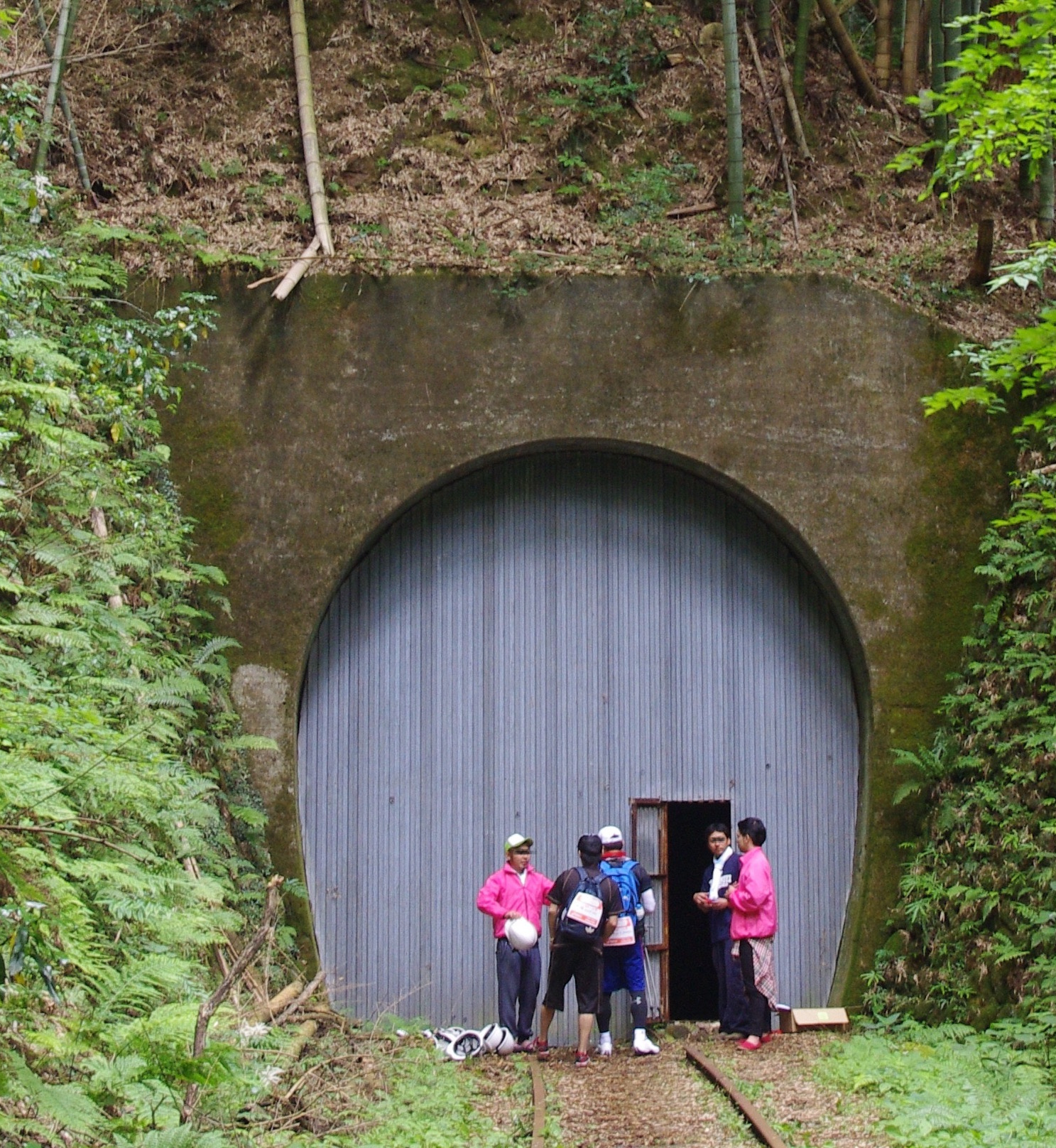 旧国鉄倉吉線山守トンネル